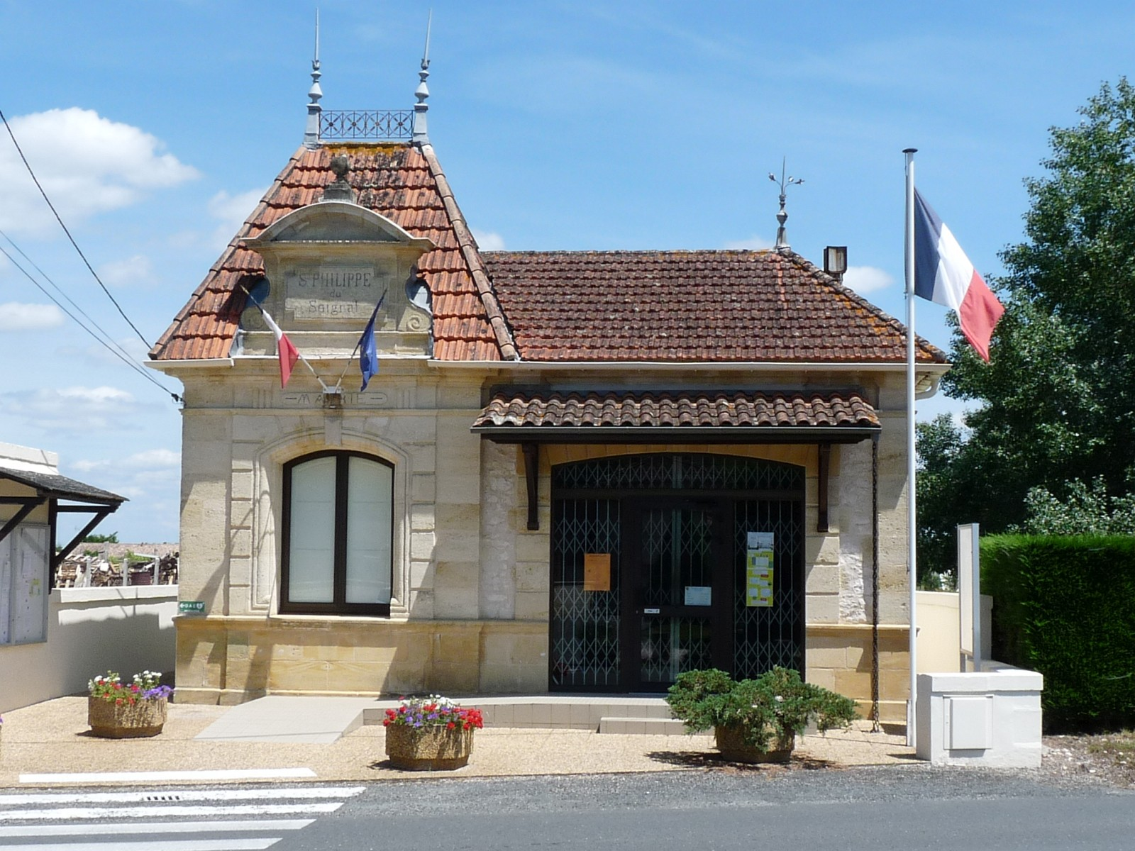 Mairie de St-Philippe-du-Seignal, Gironde, France